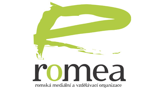 Logo občanského sdružení ROMEA